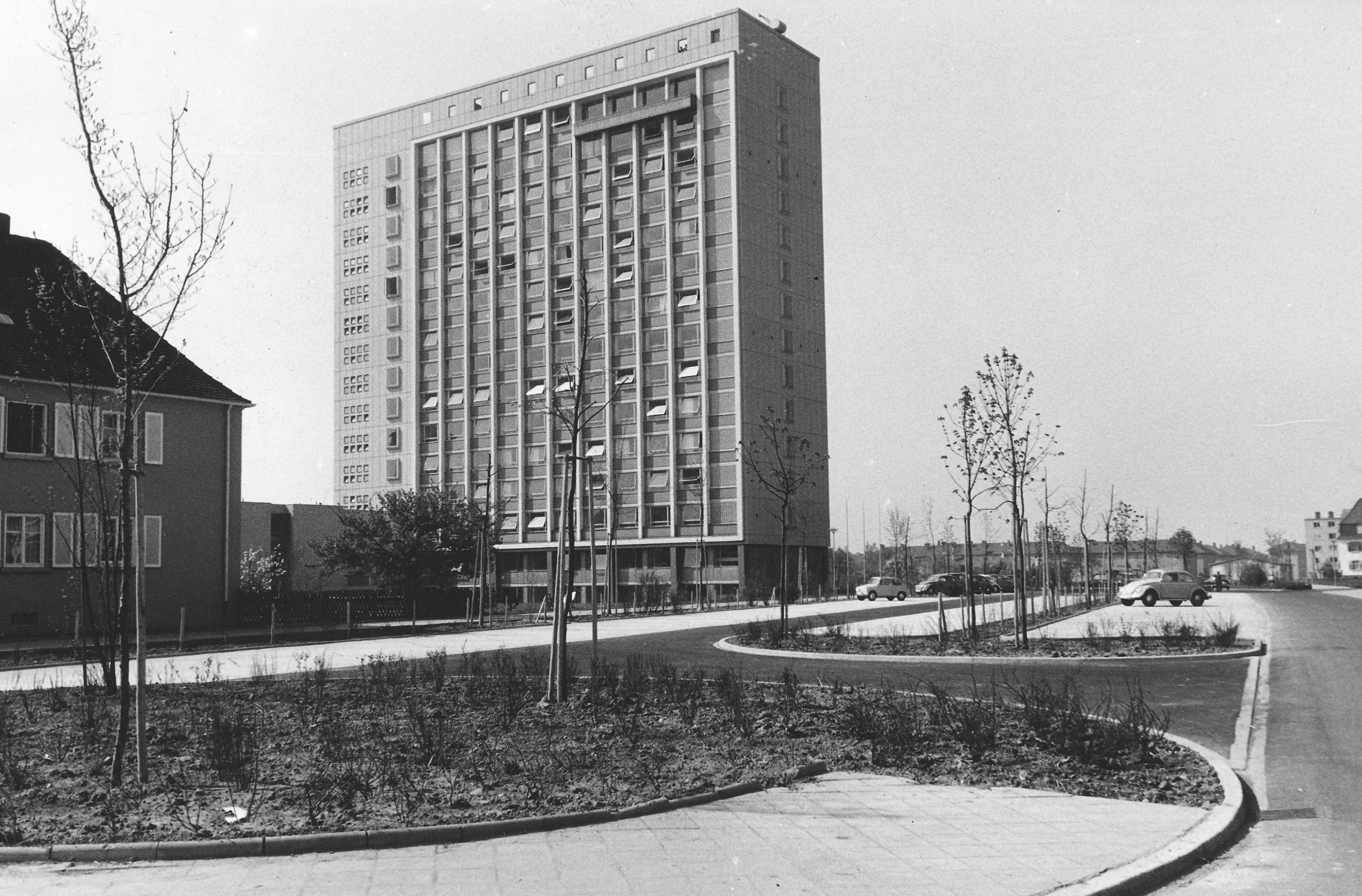 Architekturfoto des DRV-Hochhauses in Speyer.